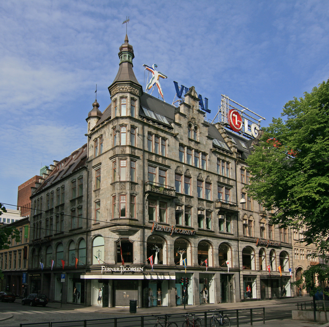 Tordenskiolds gate 1, på hjørnet mot Stortingsgata, Oslo. Forretningsgård bygd 1898; arkitekt Carl Michalsen. Tidligere Hotel Boulevard i de øverste etasjene.